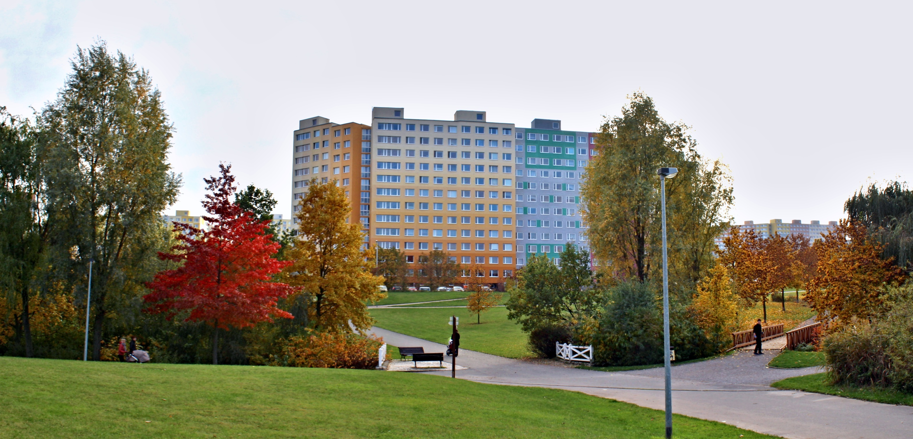 Centrální park Lužiny (Praha-Stodůlky)